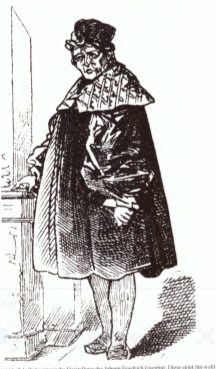 Johann Friedrich Eisenhut (1720)